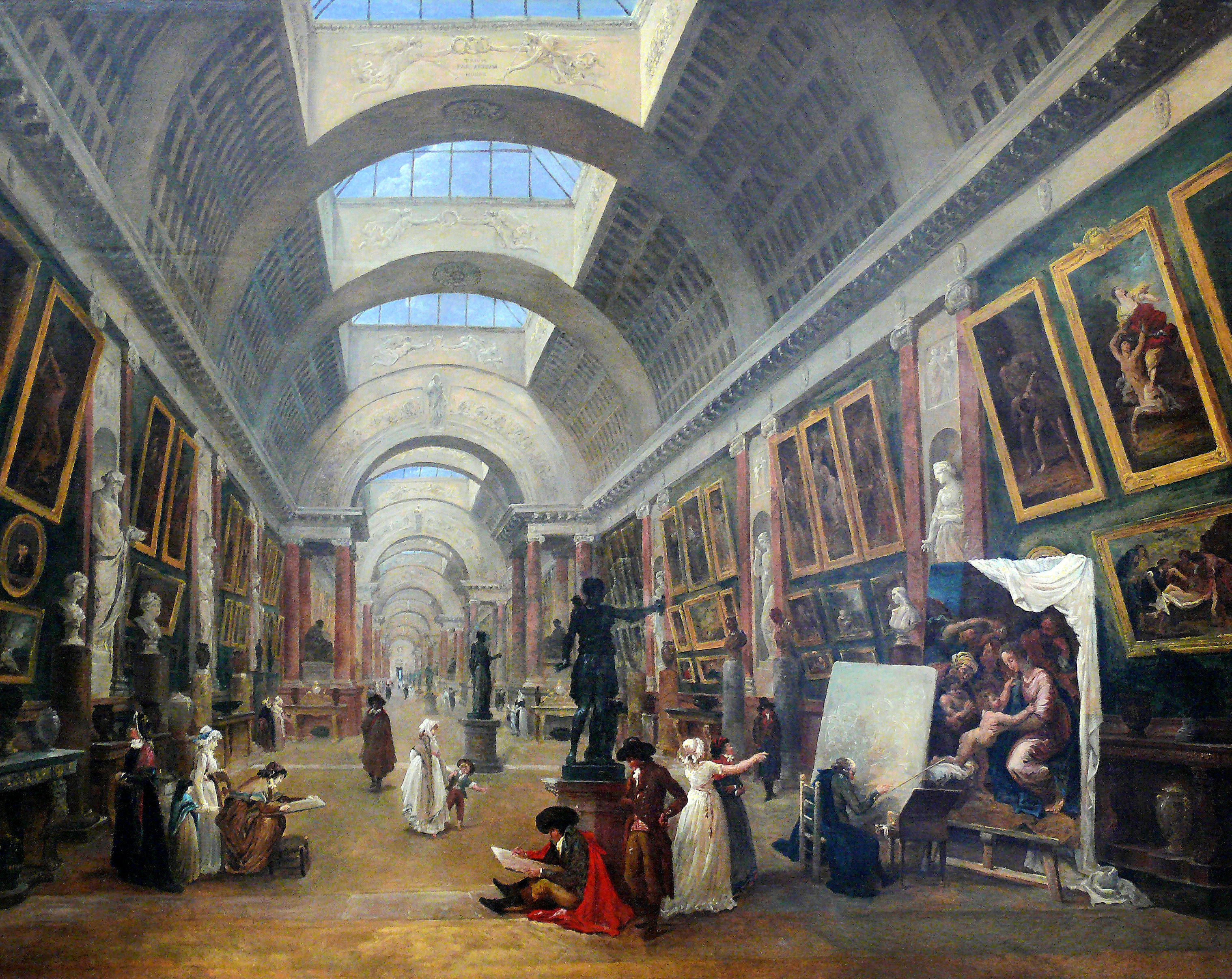 Hubert Robert avait été nommé garde des tableaux du roi en 1784. Membre du conservatoire, il a fait plusieurs dessins et peintures du musée en cours d'aménagement. Il a imaginé la Grande Galerie telle qu'elle est aujourd'hui, avec sa segmentation et l'éclairage zénithal.